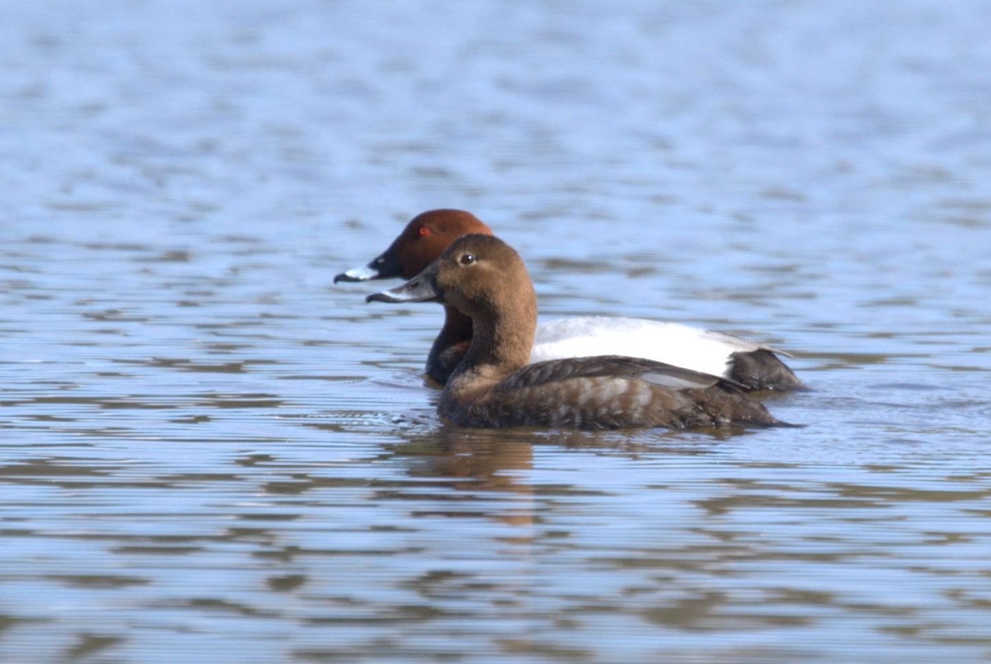 Punasotkat naaras ja koiras. Luopioinen Kukkia.